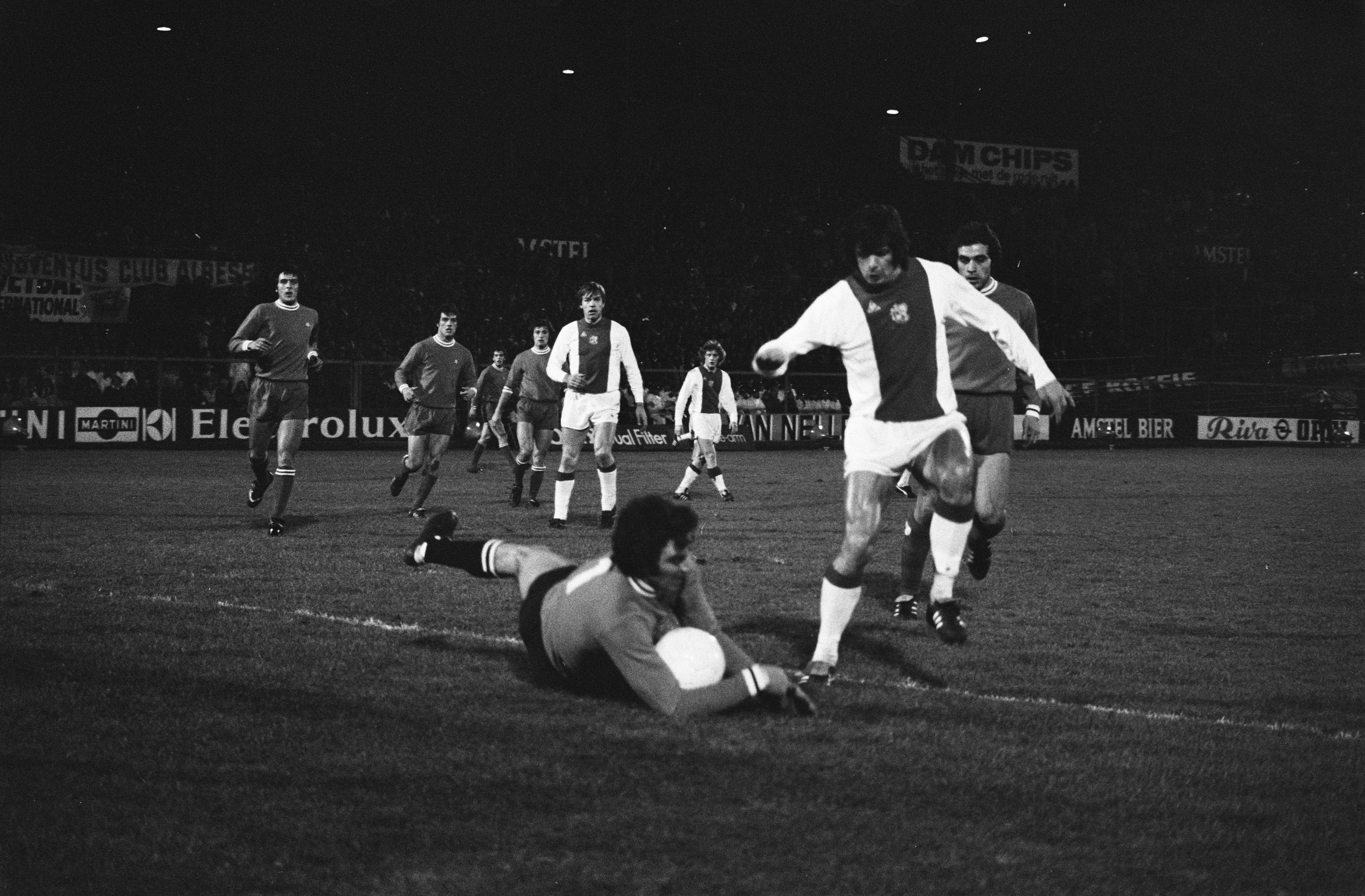 Collectie / Archief : Fotocollectie Anefo Reportage / Serie : [ onbekend ] Beschrijving : UEFA Cup. Ajax tegen Juventus 2-1, doelman Zoff is Suurbier te vlug af, Mulder kijkt toe Datum : 11 december 1974 Locatie : Amsterdam Trefwoorden : sport, voetbal Persoonsnaam : Mulder, Jan, Suurbier, Wim, Zoff, Dino Fotograaf : Verhoeff, Bert / Anefo Auteursrechthebbende : Nationaal Archief Materiaalsoort : Negatief (zwart/wit) Nummer archiefinventaris : bekijk toegang 2.24.01.05 Bestanddeelnummer : 927-6380